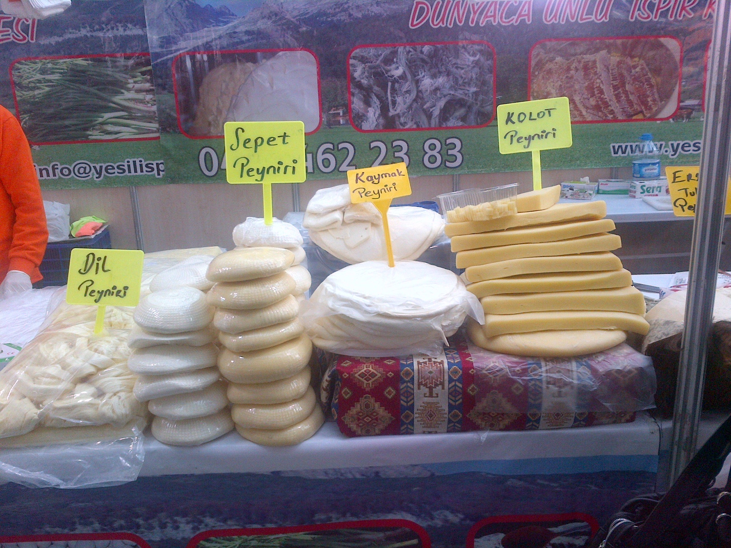 Quesos turcos - Türk peynirleri